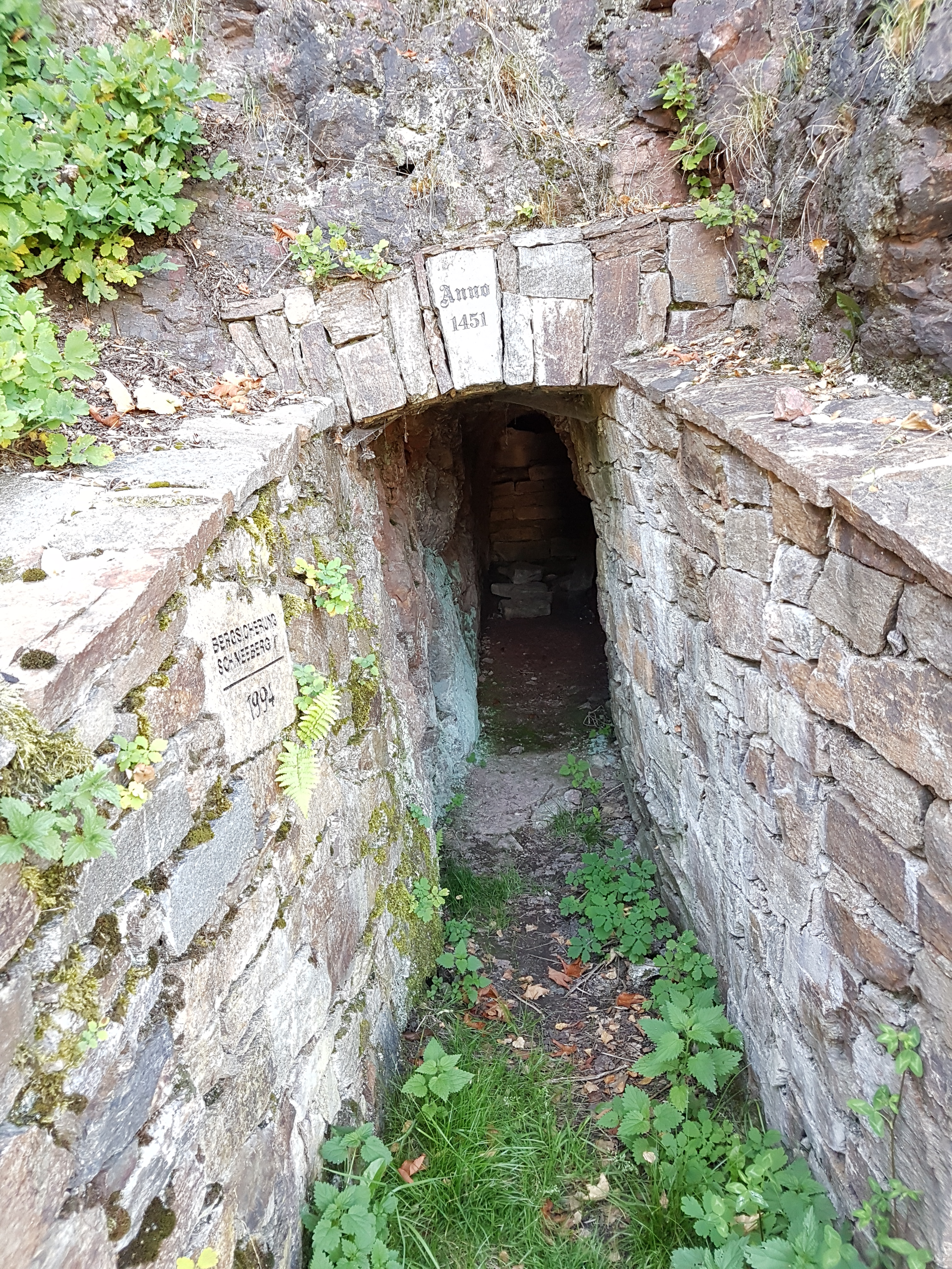 Mundloch des 1994 gesicherten Unteren Roten Felsenstollns am Geotop "Roter Kamm" am Zechenplatz in Bad Schlema.